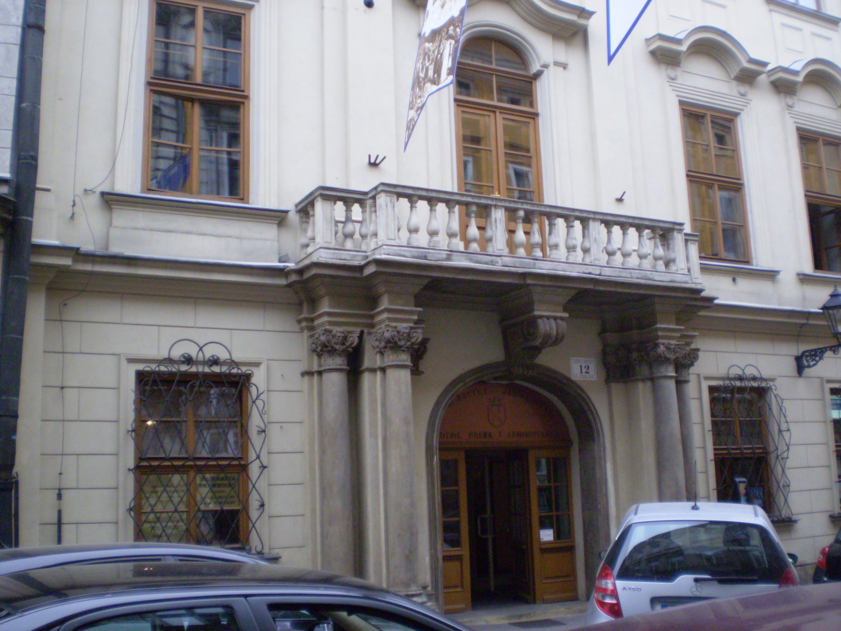 Bracka in Kraków, Poland